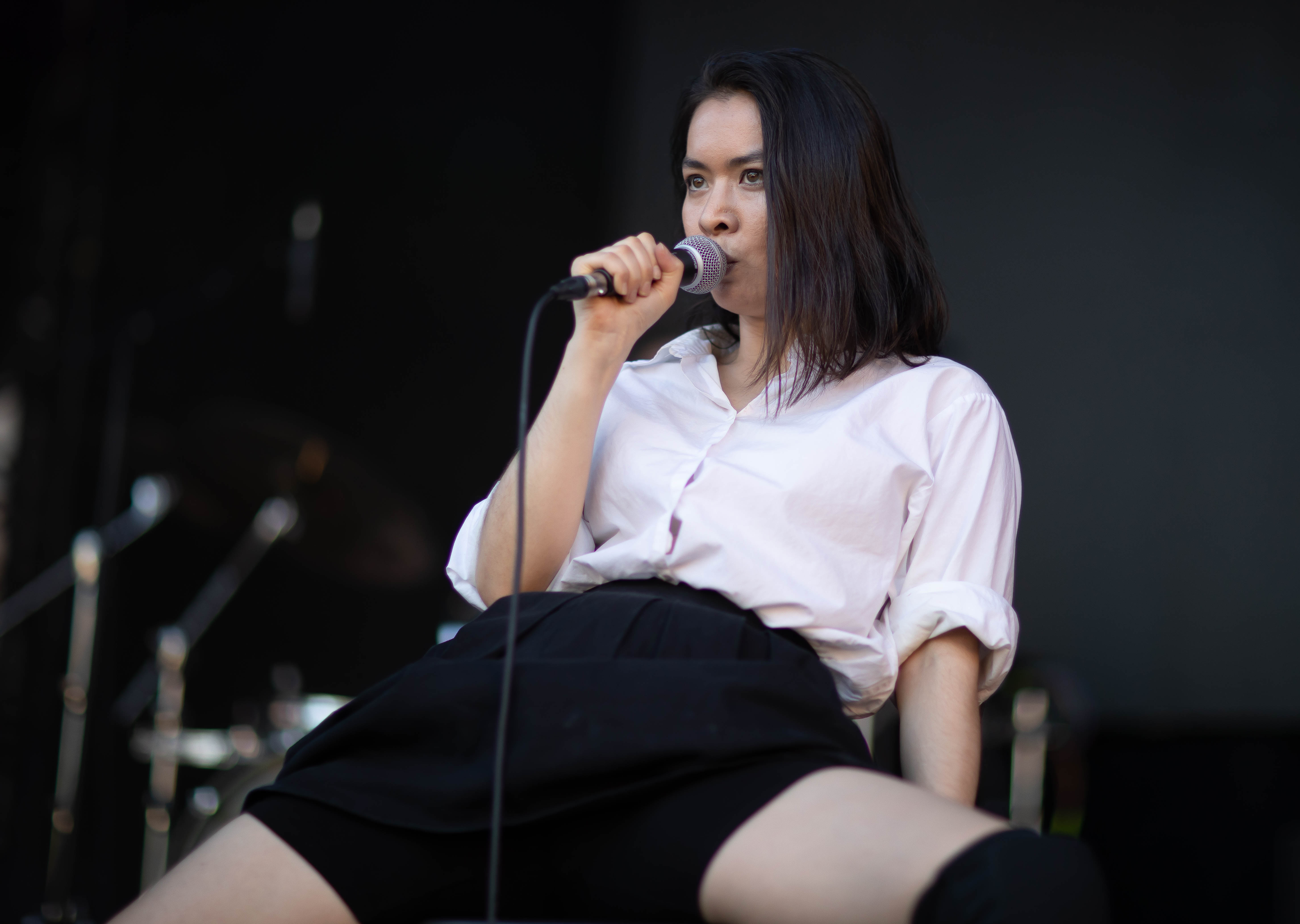 Mitksi